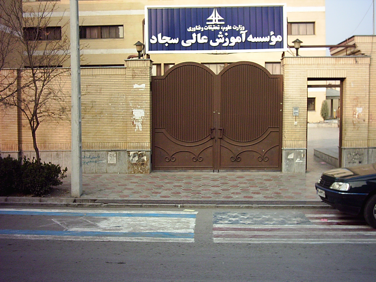 موسسه آموزش عالی سجاد واقع در مشهد ، بلوار امامت ، امامت ۶۴